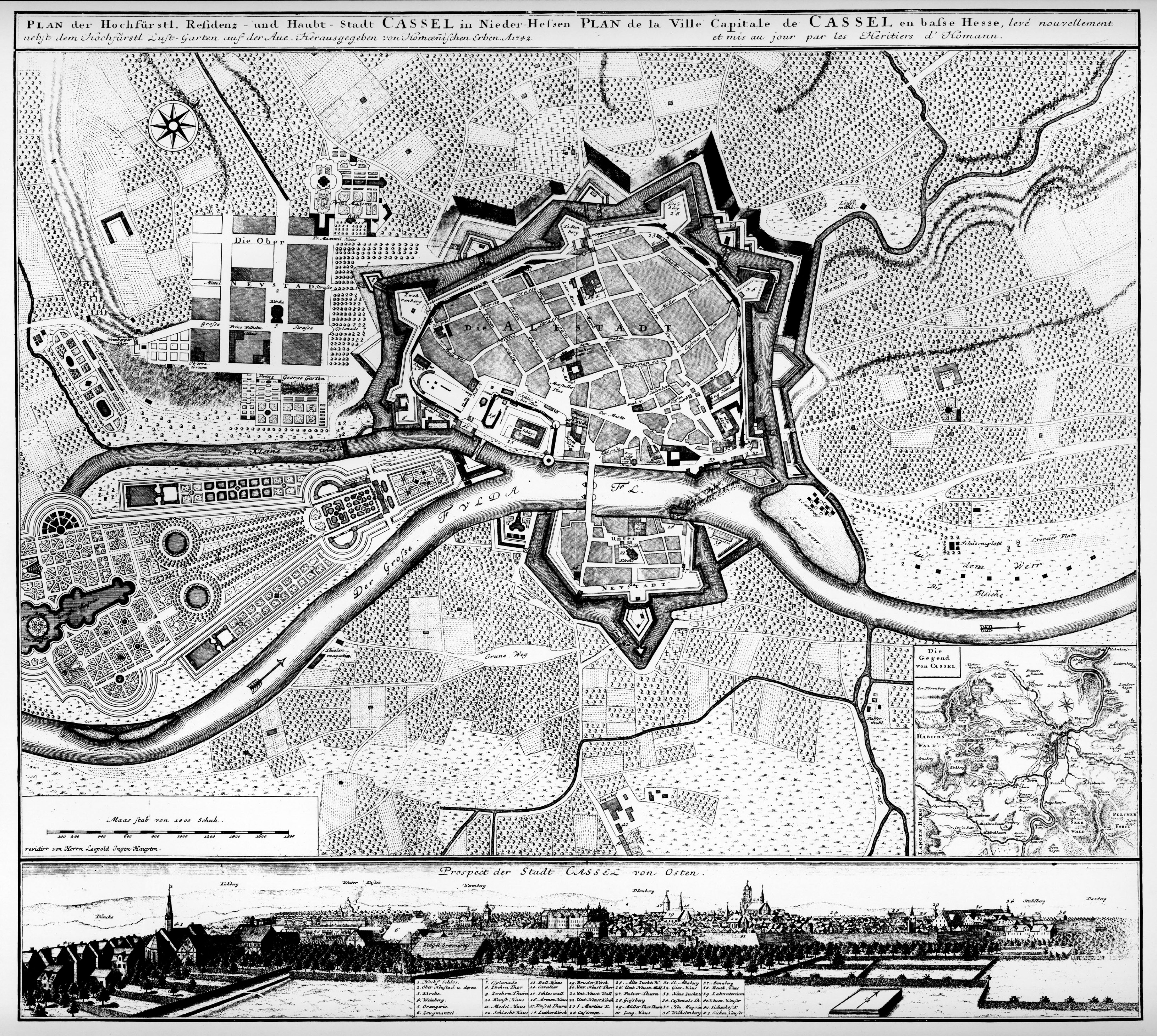 Der Leopoldplan dokumentiert zwei markante Änderungen vor den Toren der Stadt, Oberneustatt und Moritzaue werden bebaut